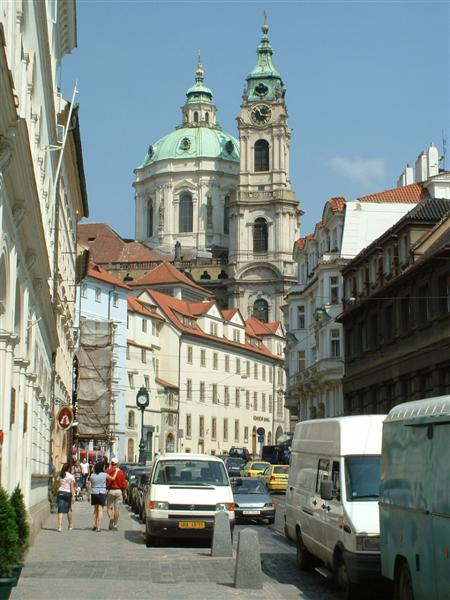 Malá Strana